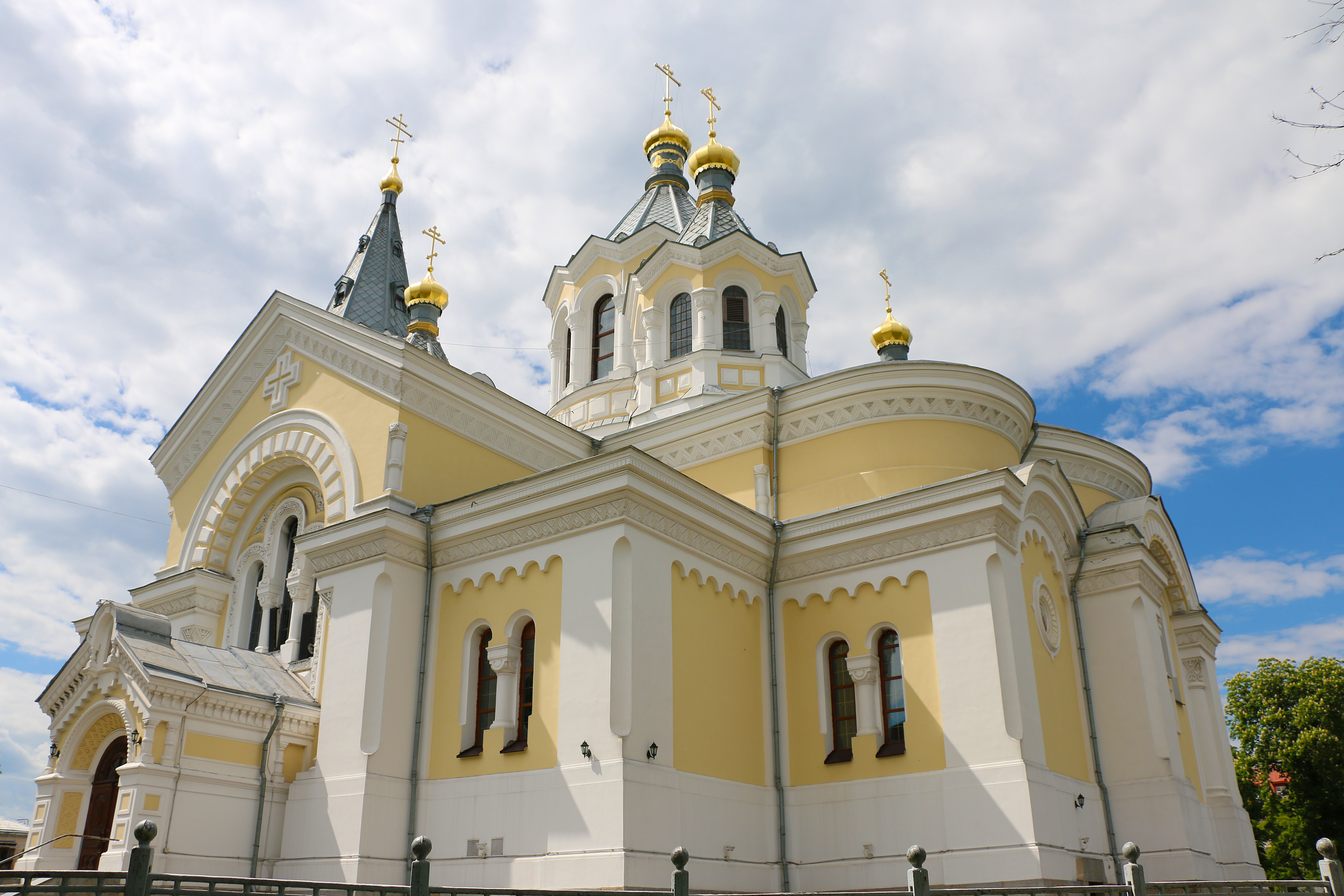 Преображенський собор, Житомир, майдан Перемоги, 12/14